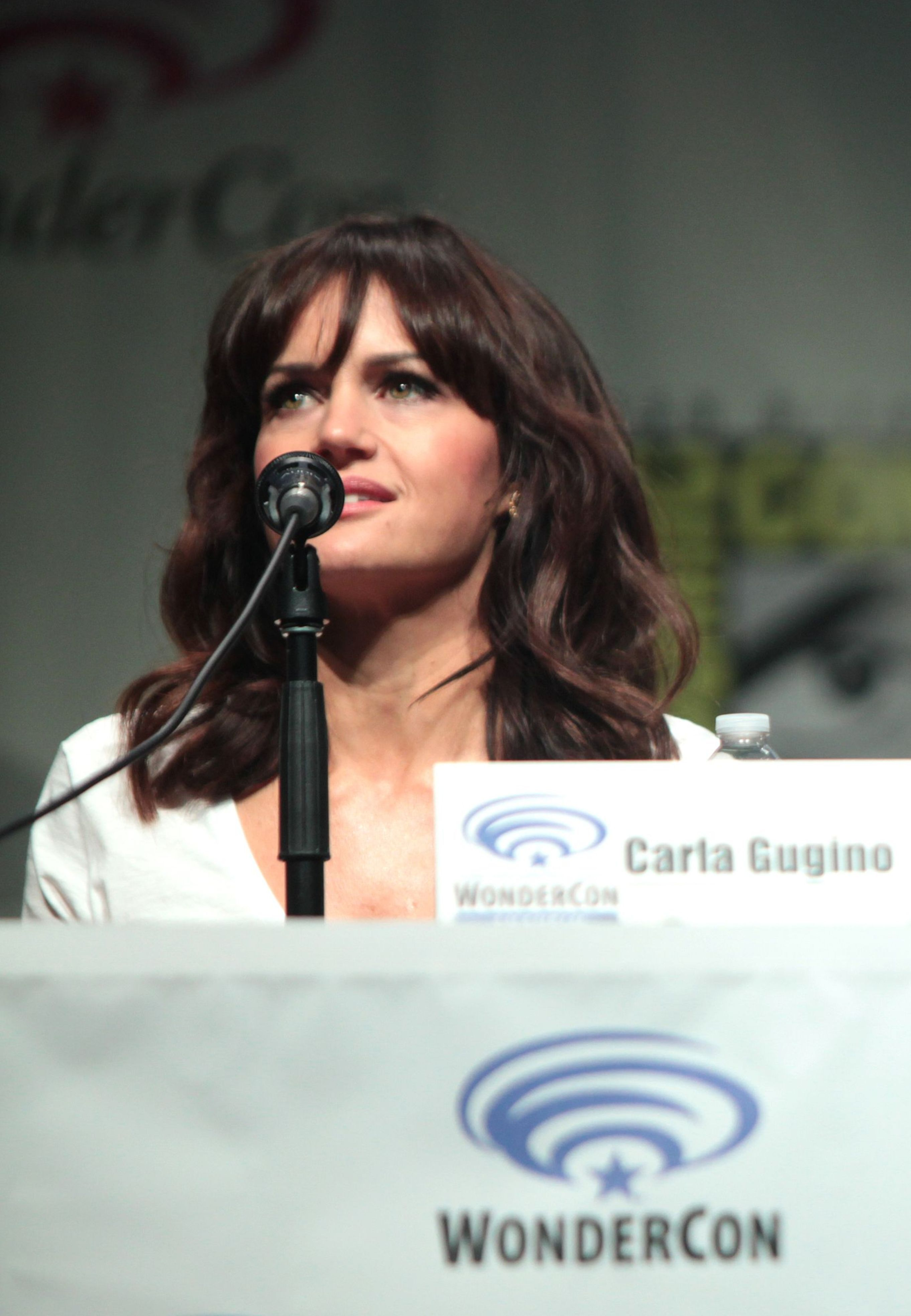 Carla Gugino lors d'une interview au Wondercon 2015, pour le film San Andreas, Californie